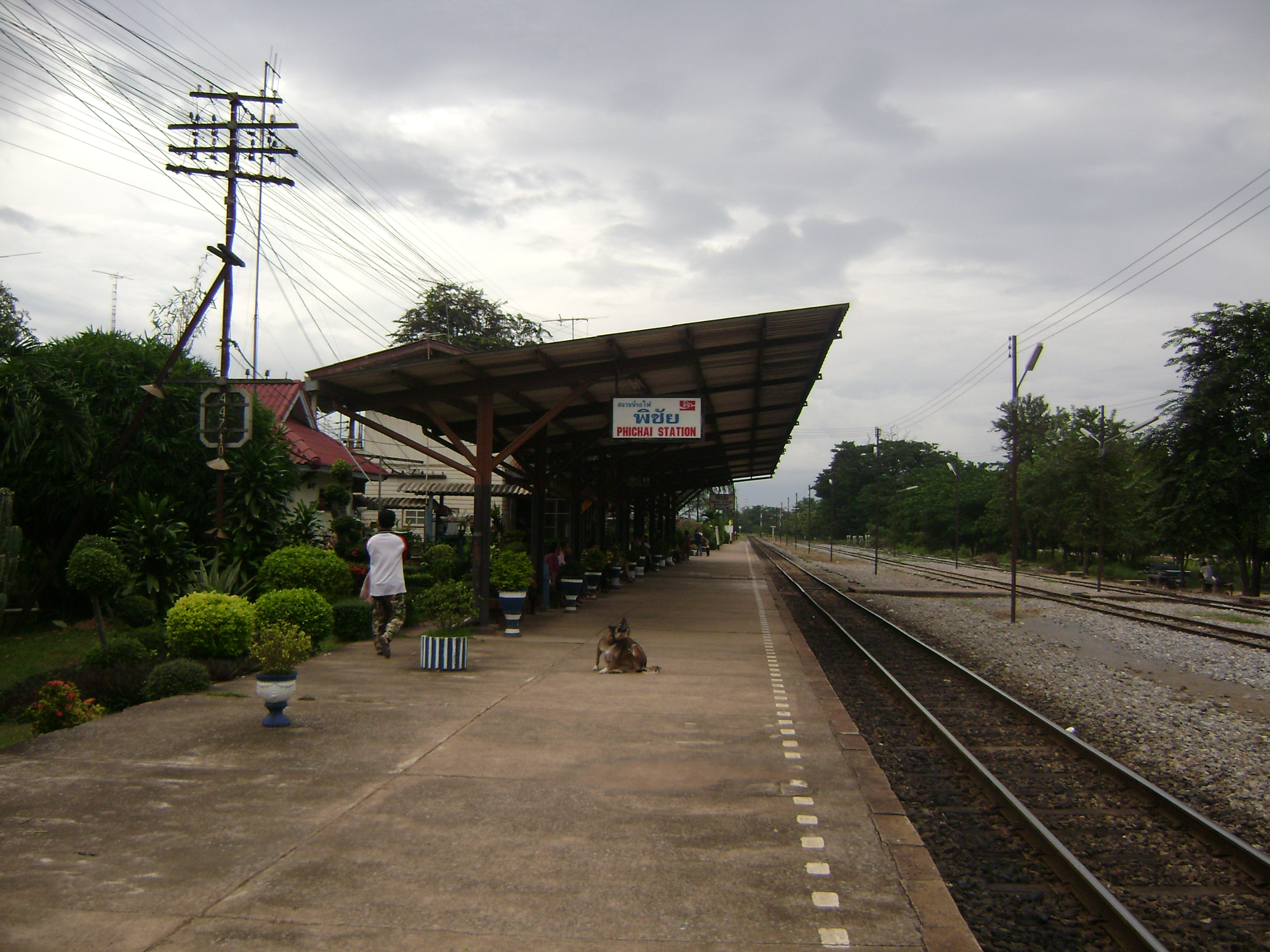 สถานีรถไฟพิชัย จังหวัดอุตรดิตถ์